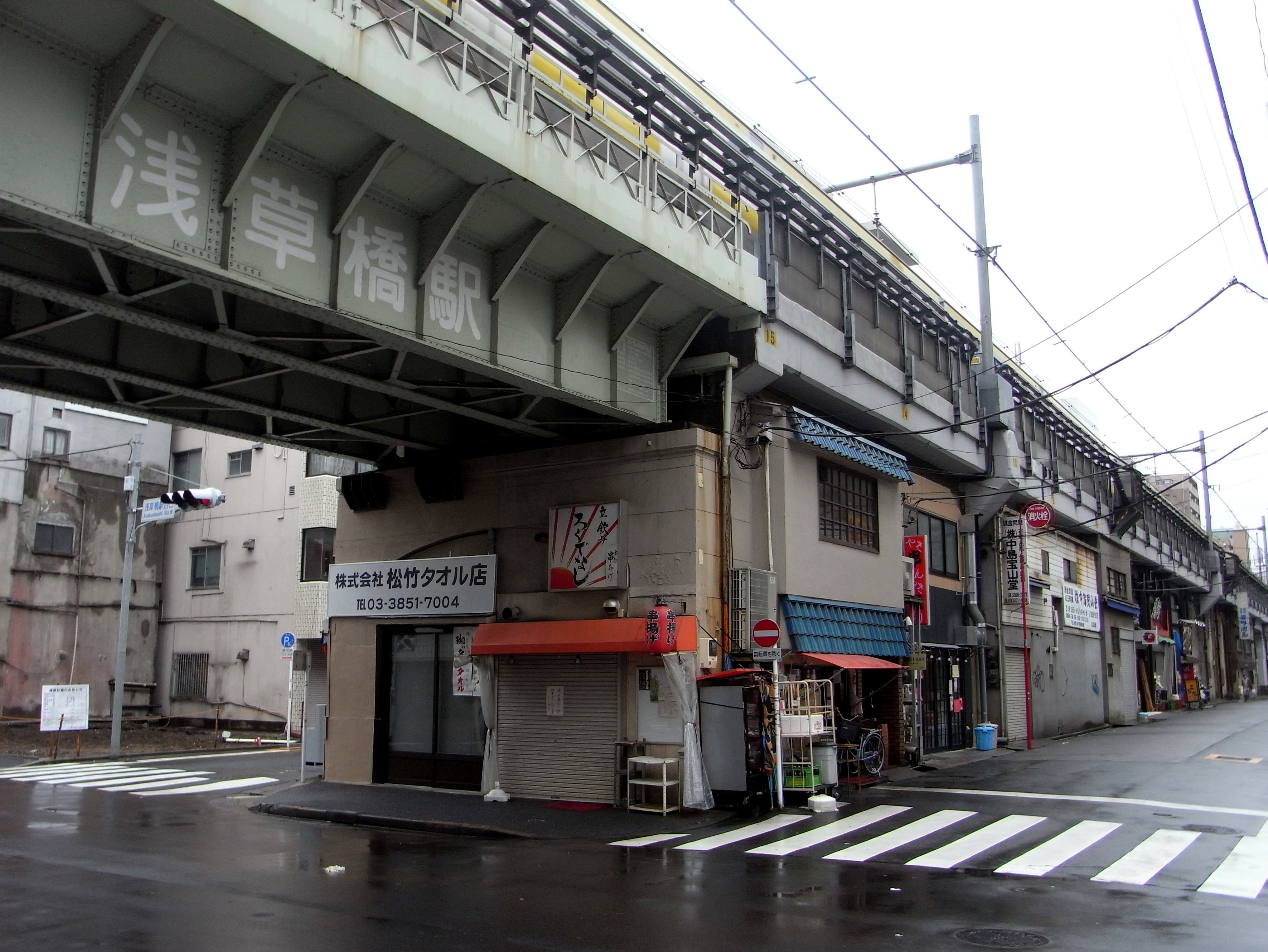 松竹タオル店。浅草橋駅高架下。